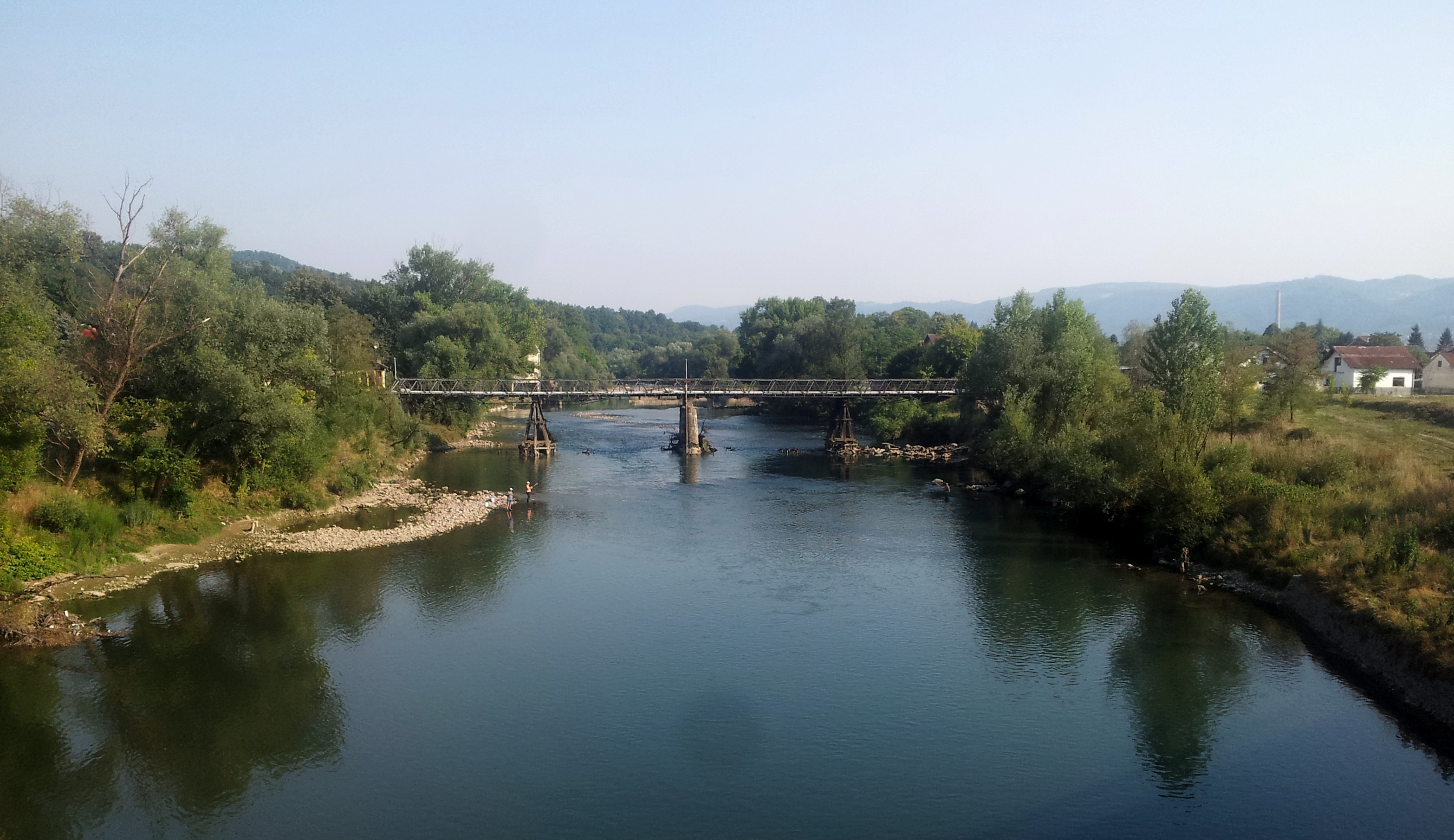 Подручје управљања стаништем Водоток и приобаље ријеке Врбас у градском подручју, Бања Лука This image was uploaded as part of Trace of Soul 2015.